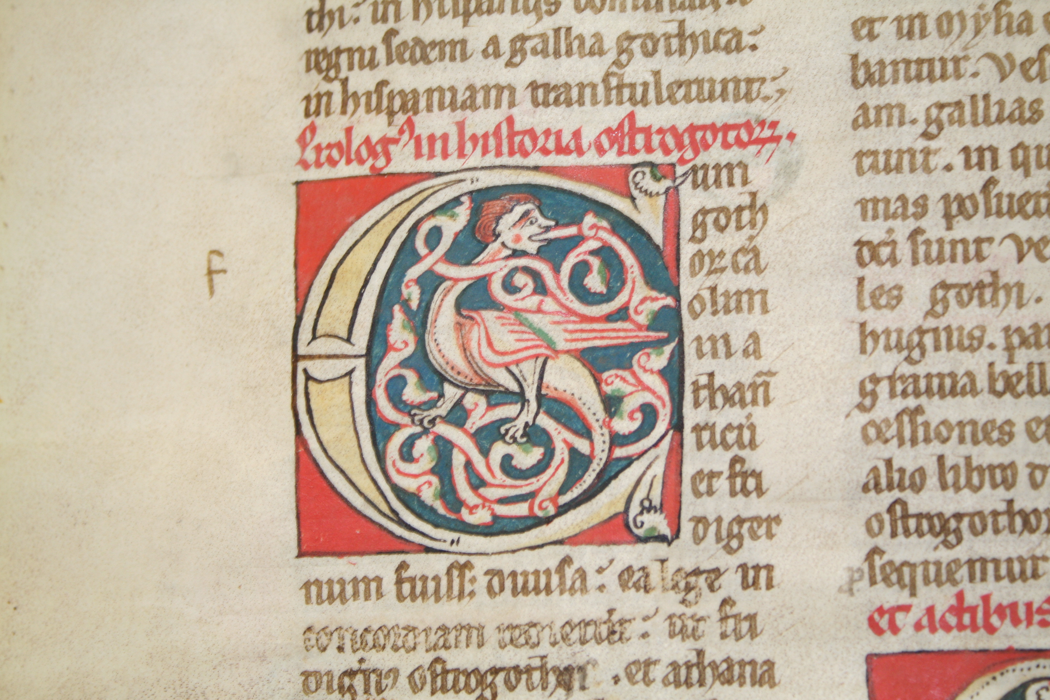 Chronica Hispaniae / Rodrigo Ximénez de Rada. S. XIII.